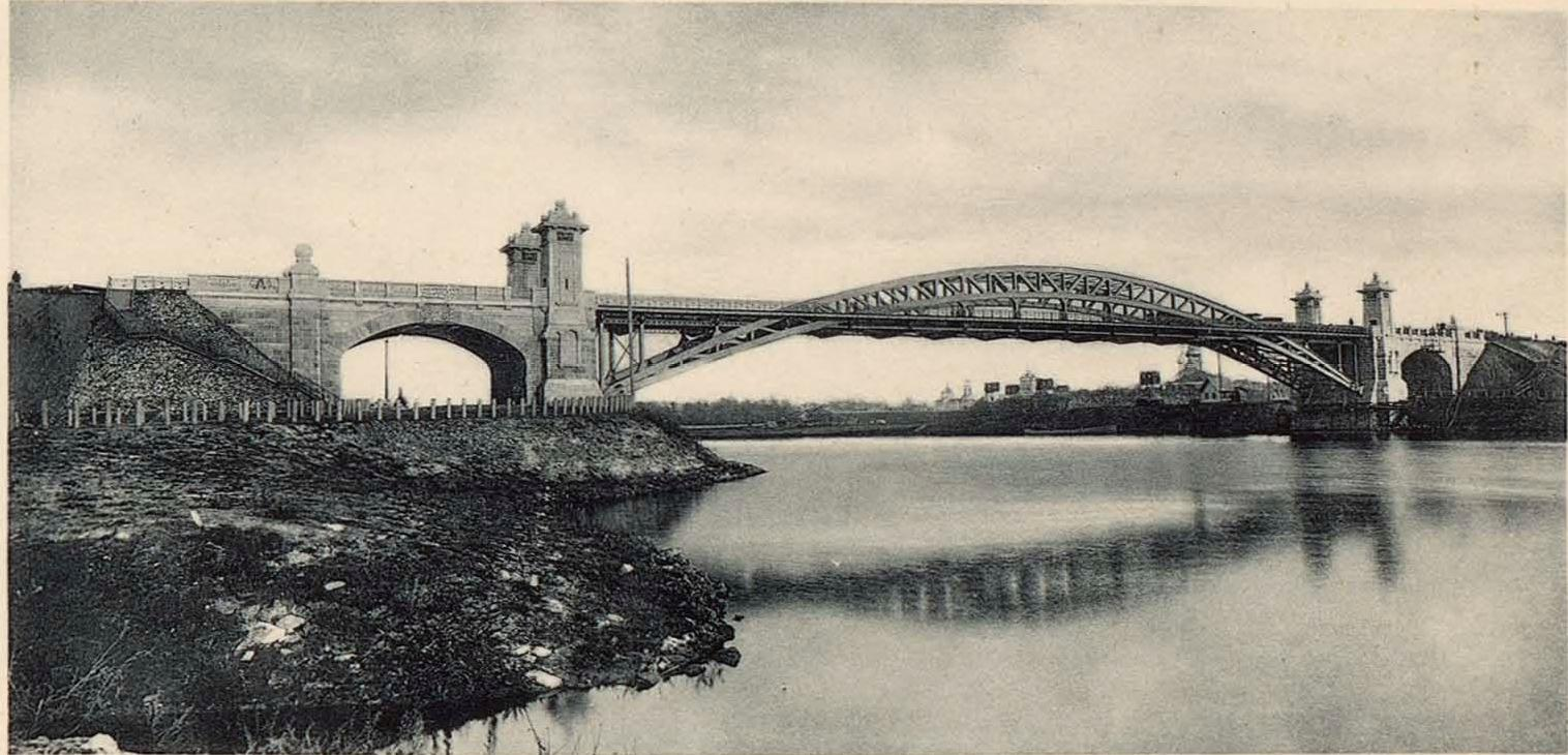 Россия. Управление по сооружению Московской окр. ж. д. Альбом исполнительных типовых чертежей : [С объясн. текстом] : 1903-1908. [Т. 1] / МПС. Упр. по сооружению Моск. окр. ж. д. - Москва, 1909. - 45х53. Т. 1. - [1909]. - [6], XXVIII, 234 с.